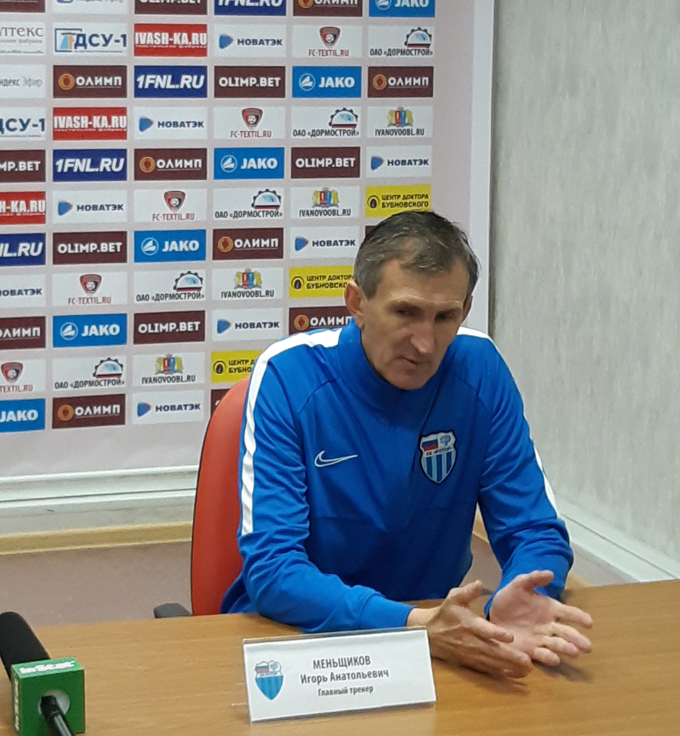 Игорь Меньщиков на пресс-конференции после матча "Текстильщик" - "Ротор" (27 октября 2019 года).